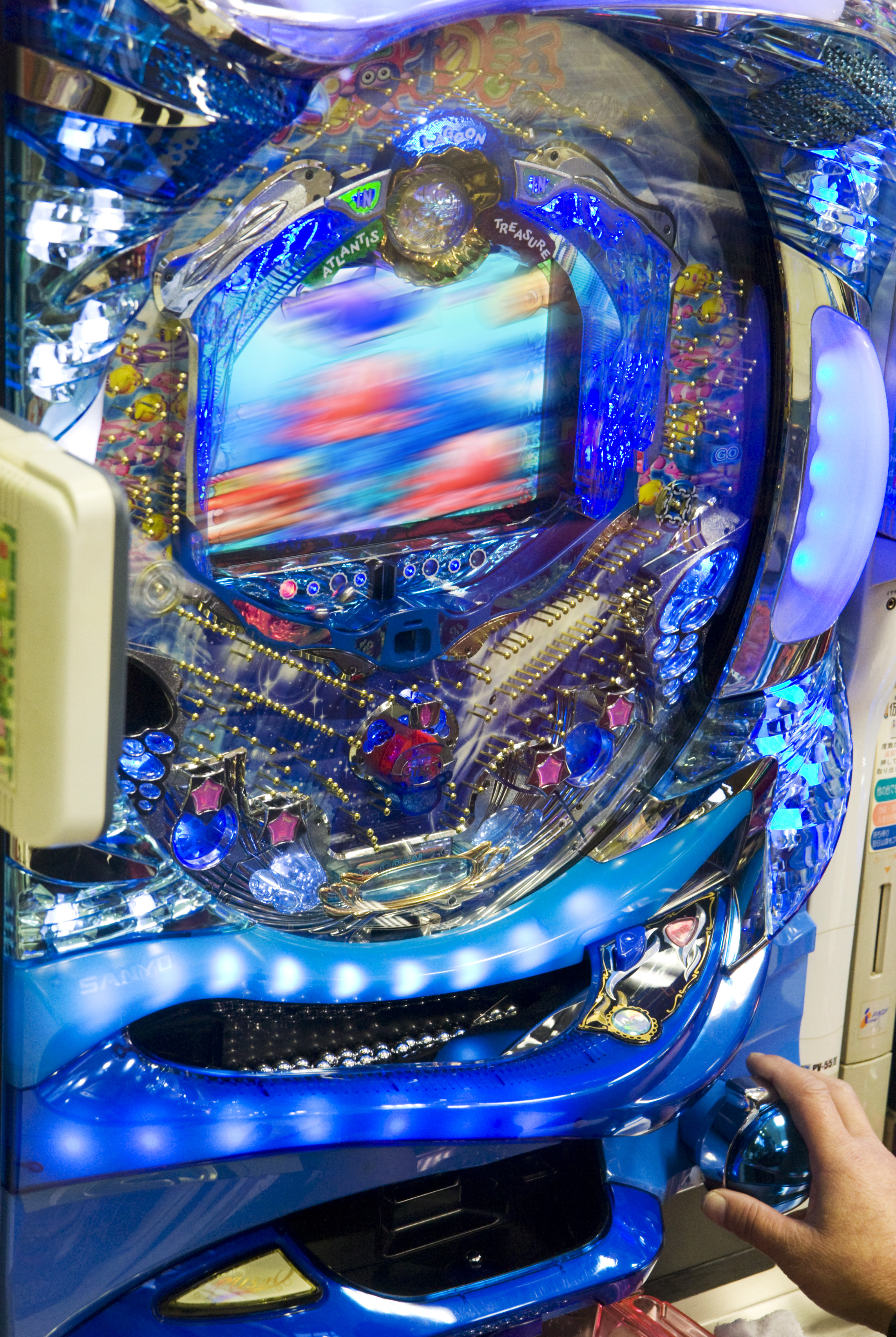 Pachinko machine, Tokyo.